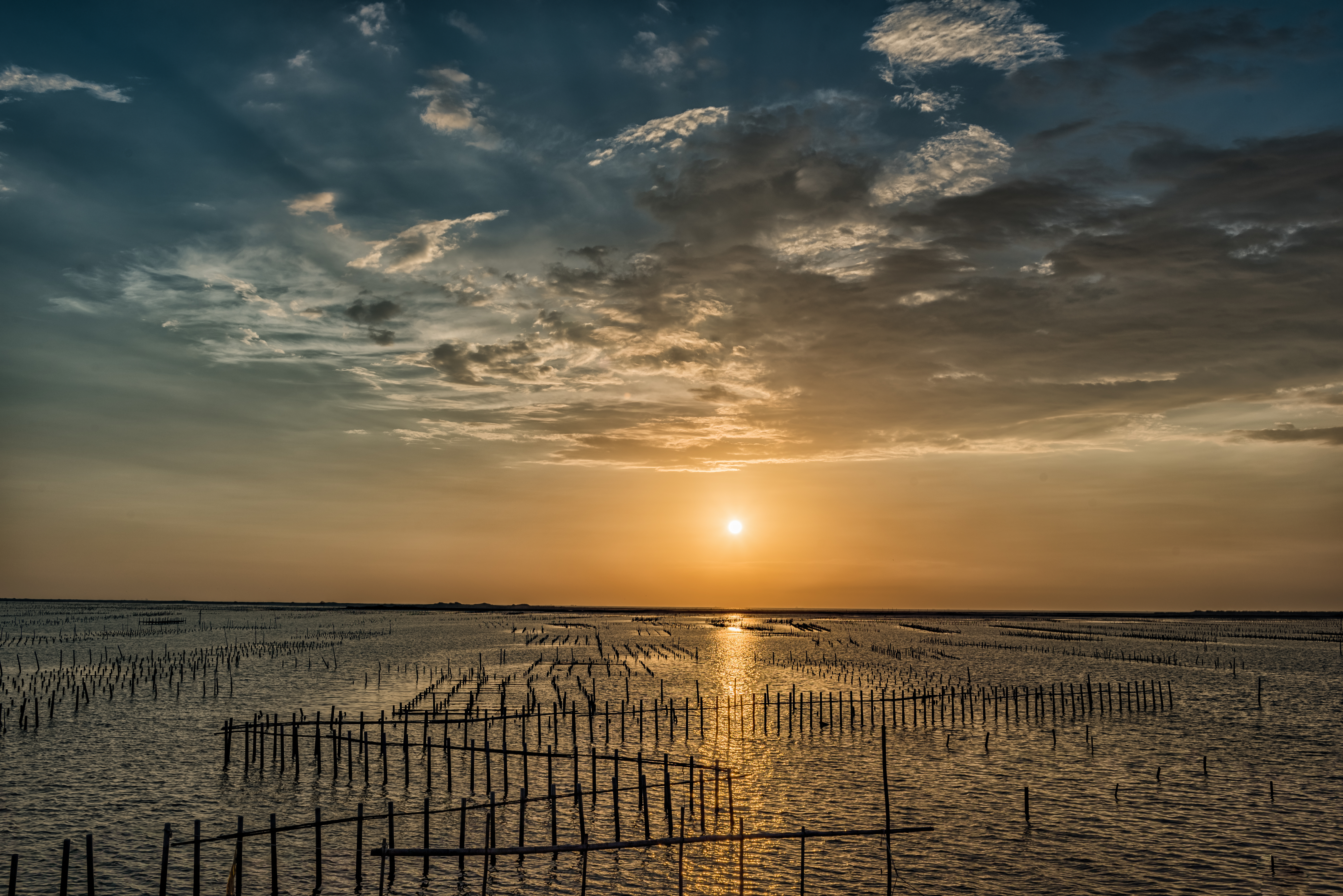 七股潟湖的蚵架在適當潮汐下與夕陽相映成趣